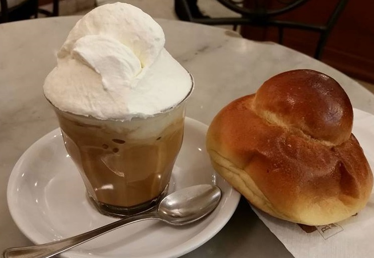 Granita Caffè e Panna (fresca). Tipica della Città di Messina.